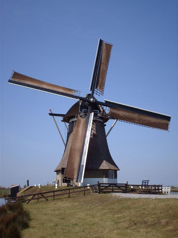 Grevensmolen bij Vegelingsoord